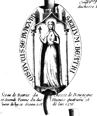 Beatrix Navarrská